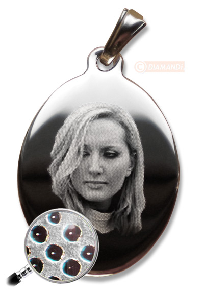 Beispiel einer Fotogravur hergestellt mit einem Diamantenstichel, Material hochglanzpolirter Chirurgenstahl